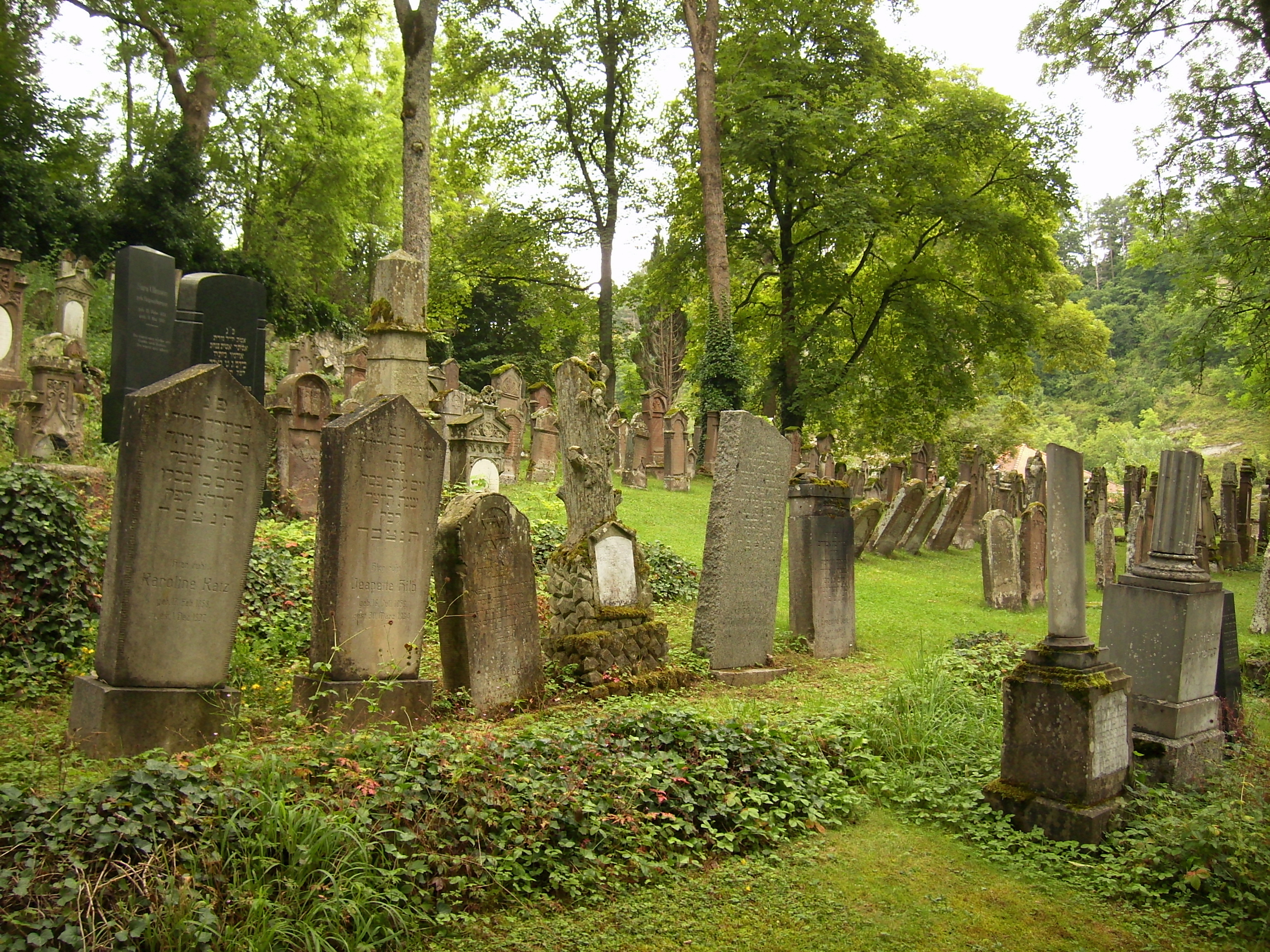 Haigerloch Jüdischer Friedhof